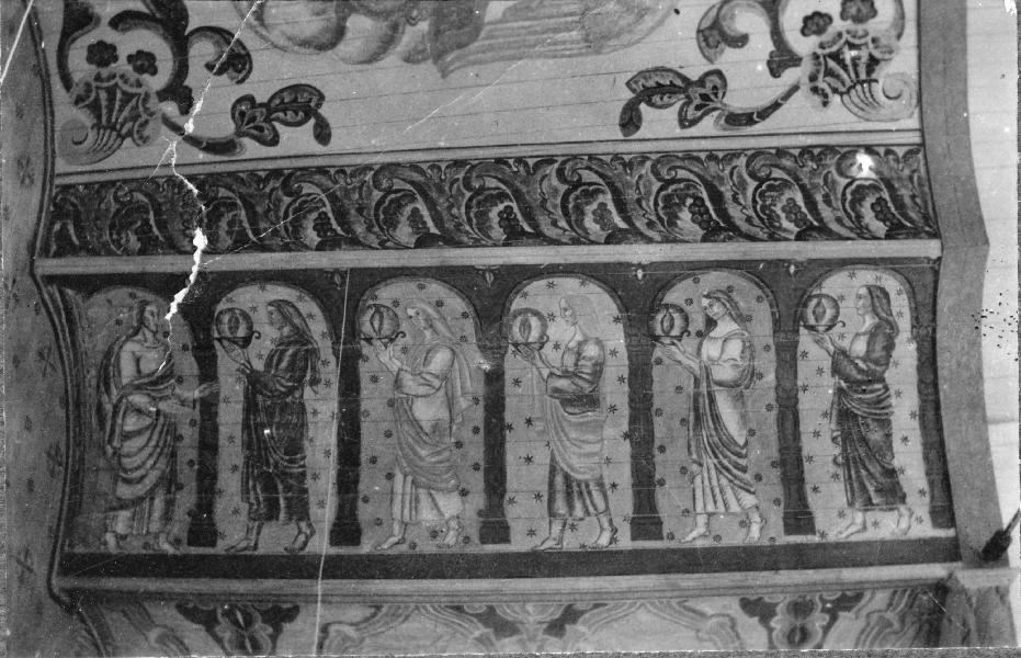 Takmålning i koret, utförd av Yngve Lundström, de visa och fåvitska jungfrurna Kategori: (03) Målningar på träTakmålning i koret, utförd av Yngve Lundström, de visa och fåvitska jungfrurna.